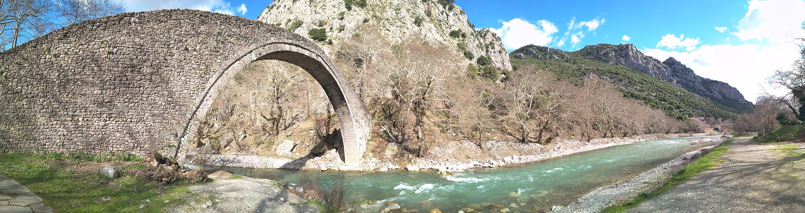 Πανόραμα του Πορταϊκού ποταμού και του τοξωτού γεφυριού«Γέφυρα Πορταϊκού»